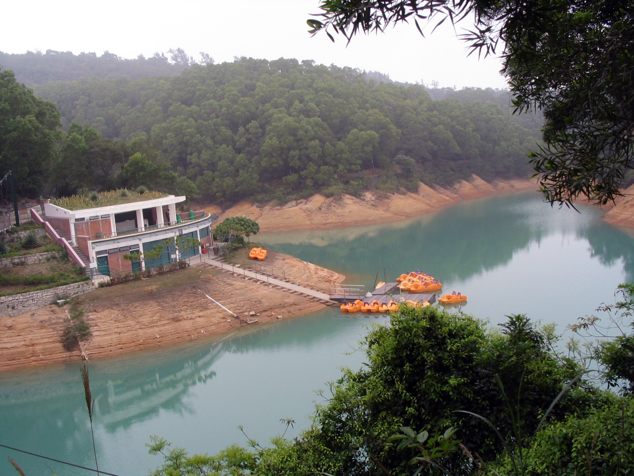 Photo of Parque Natural da Barragem de Hac Sa